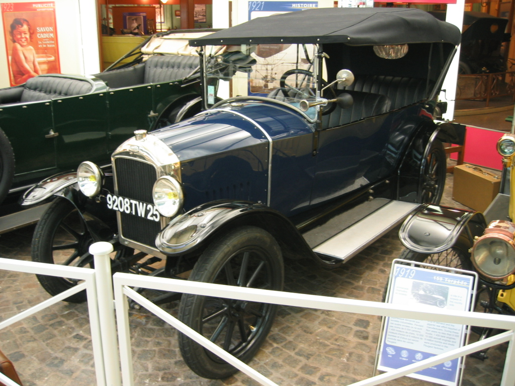 Peugeot Type 163 Torpedo 1921 - Musée Peugeot de Sochaux